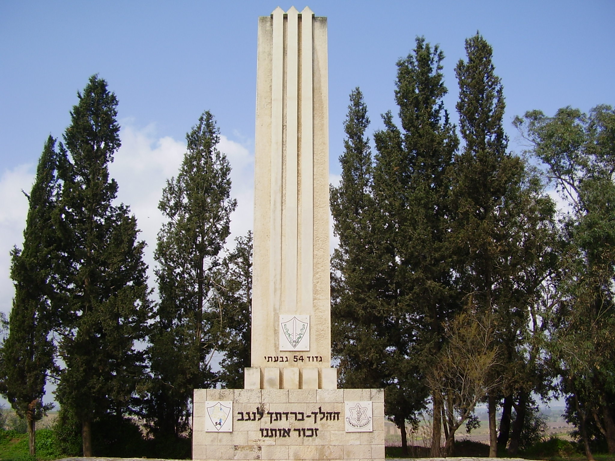 givati brigade memorial, negev, israel